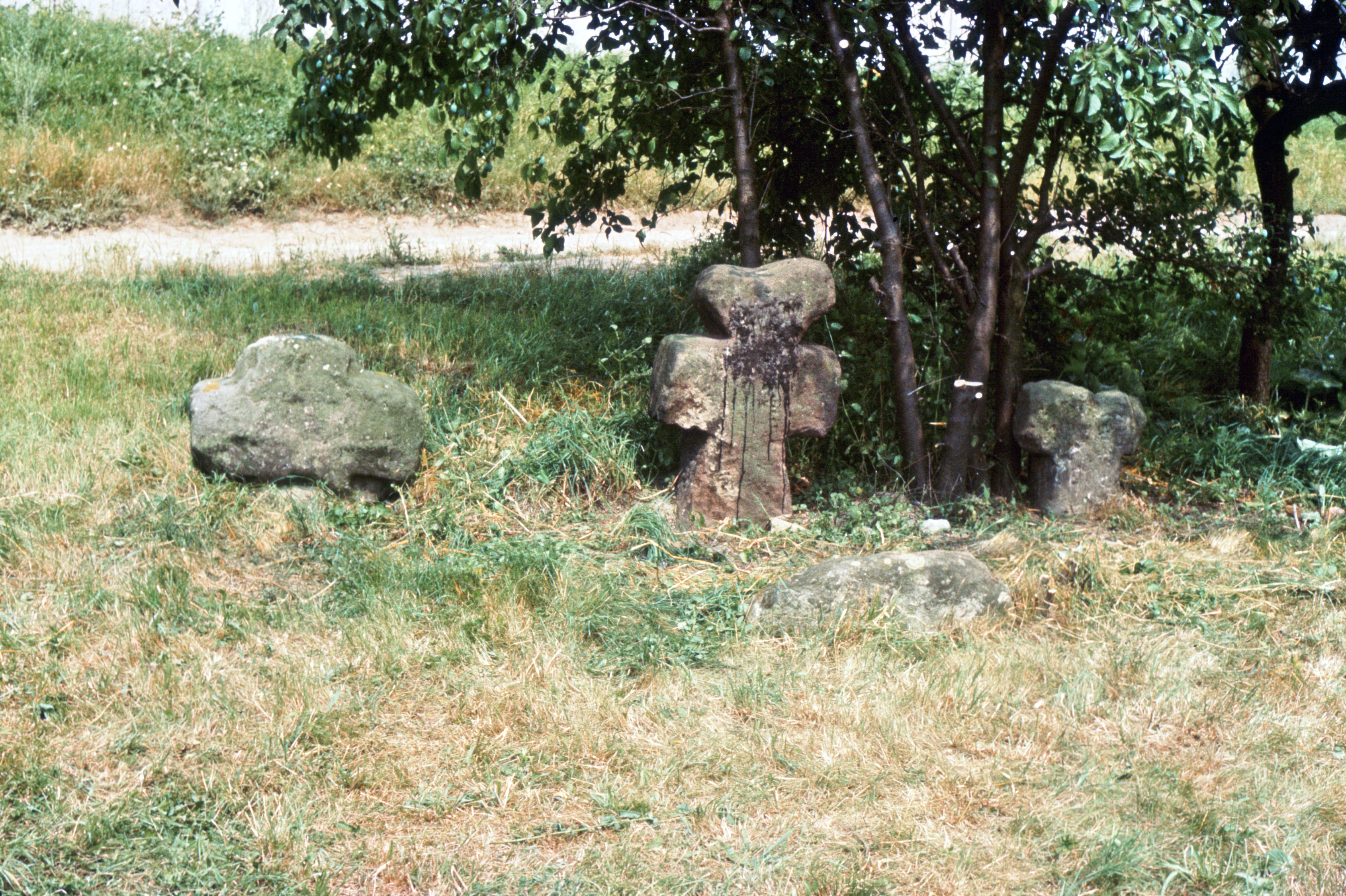 Die Steinkreuze in Allstedt am Kreuzberg. Rechts vor dem mittleren Kreuz liegt der Schaft eines weiteren Kreuzes eingegraben. is a photograph of an architectural monument. 30037